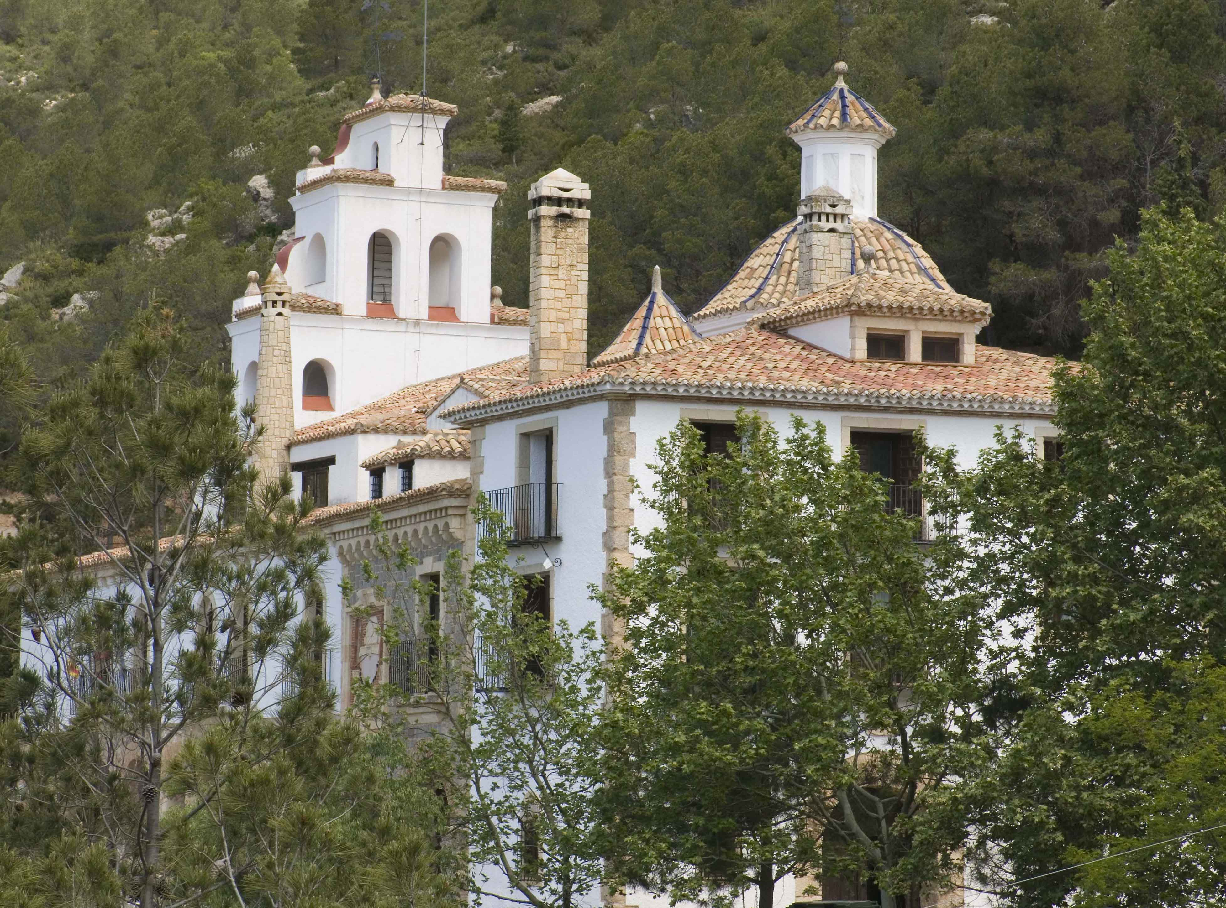 Ermita del Remei (Utiel) Segle XVI, gòtic, barroc i neoclàssic. País Valencià